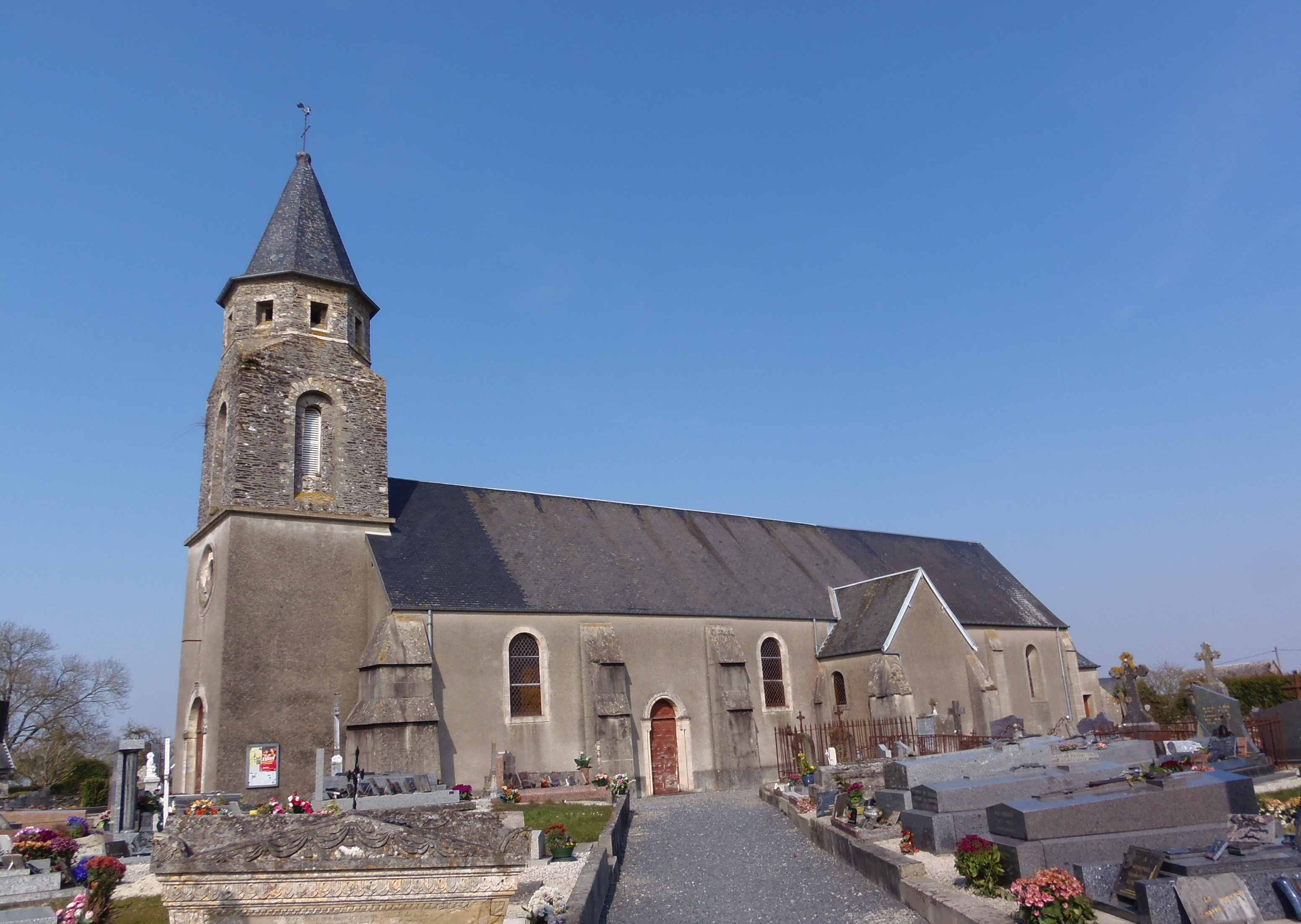 La Bazoque (Normandie, France). L'église Saint-Martin.